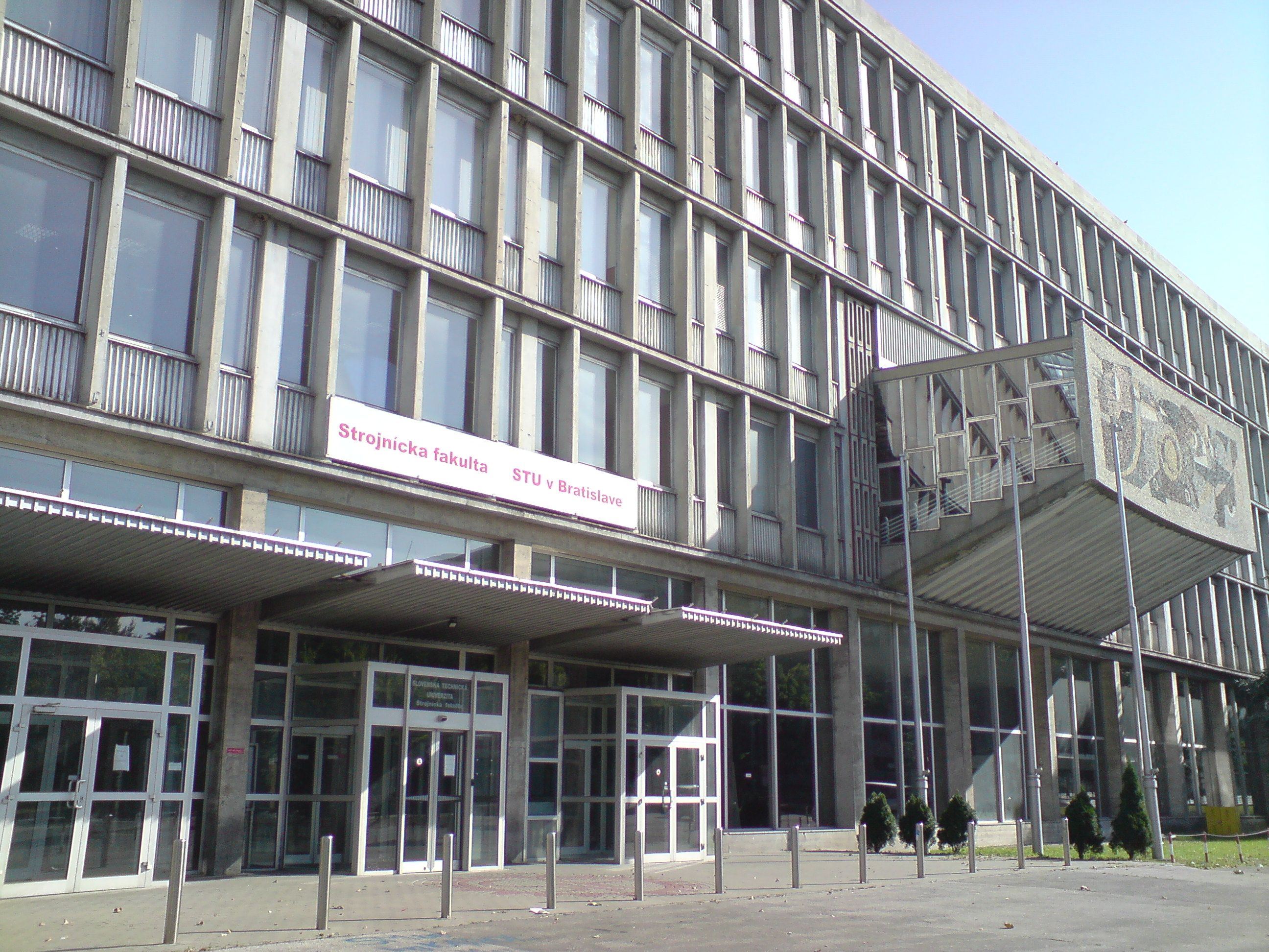 Námestie slobody, Bratislava